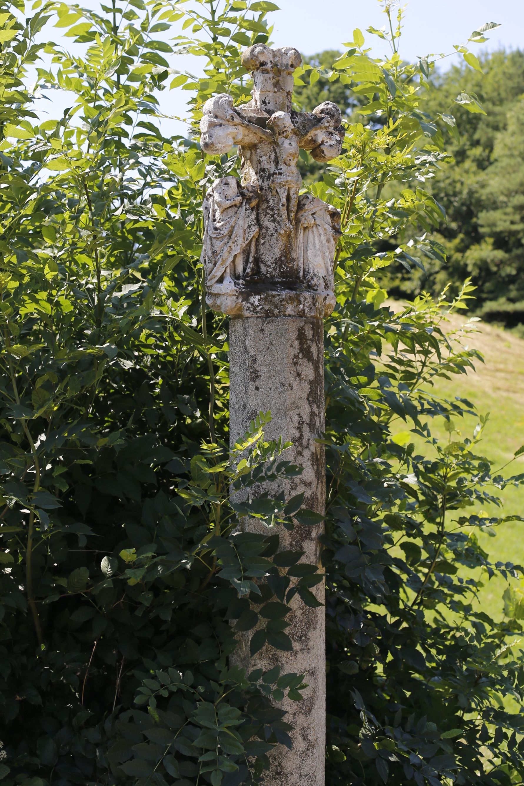 Croix de Malangle à Chanac-les-Mines. .